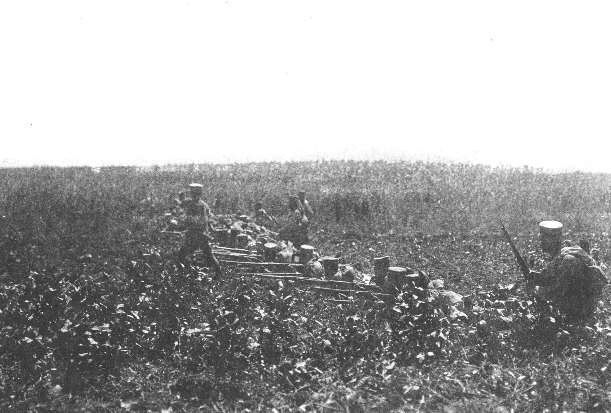 日露戦争において戦闘中の歩兵第45連隊